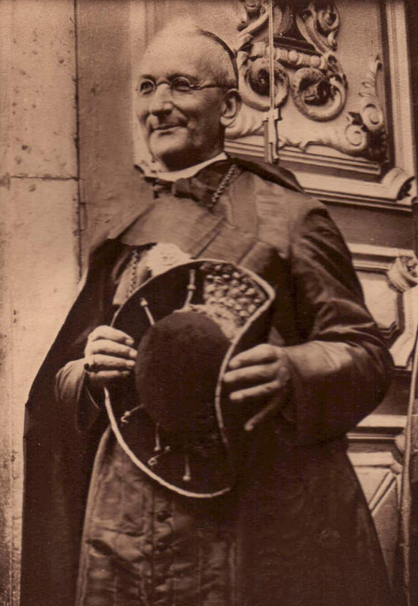 S.E le Cardinal Lépicier portant le grand cordon du Nichan-Iftikhar